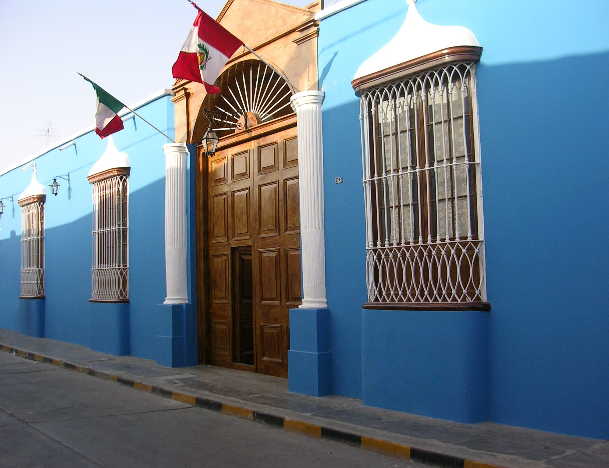 Fachada - Casa muséo Antonio Raimondi Dell'Acqua